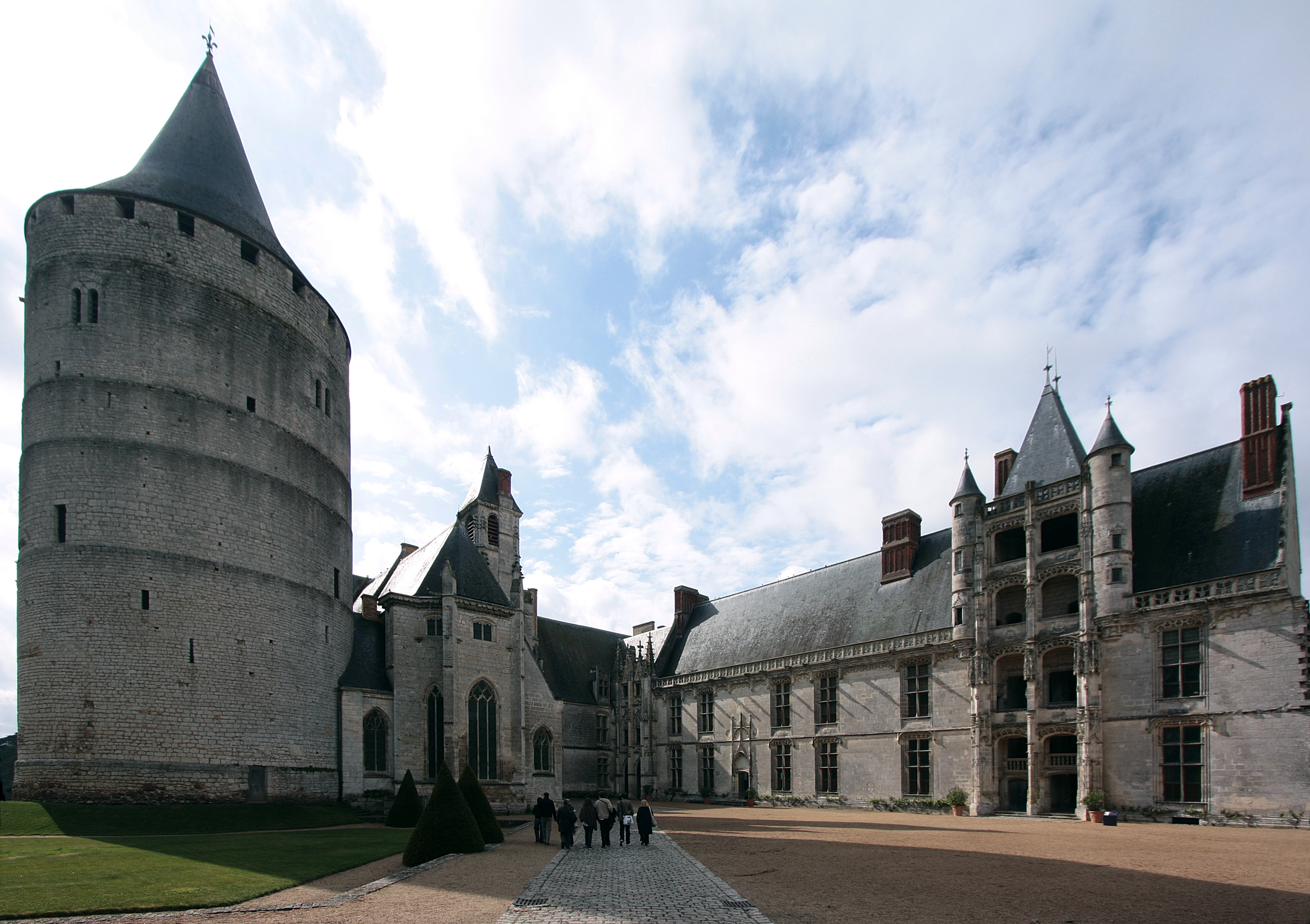 Château de Châteaudun, Département Eure-et-Loir/Frankreich - Bergfried, Kapelle und Ehrenhof mit dem Longueville-Flügel